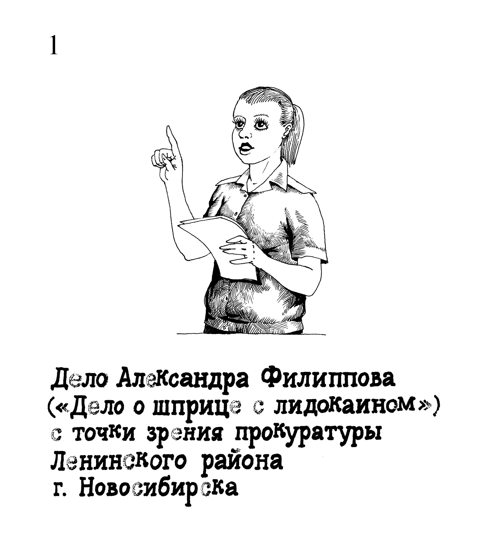 Прокурор